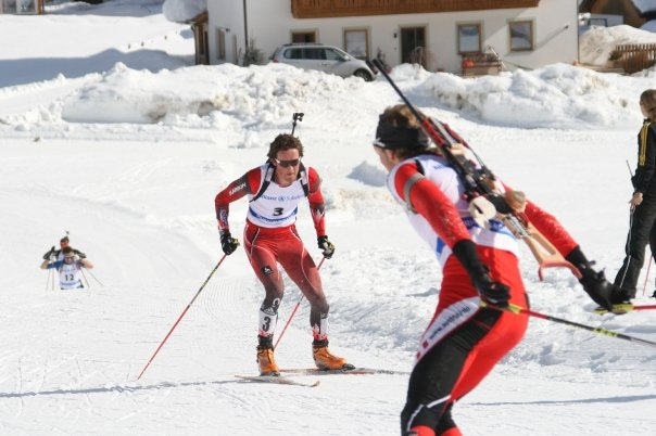 See Title